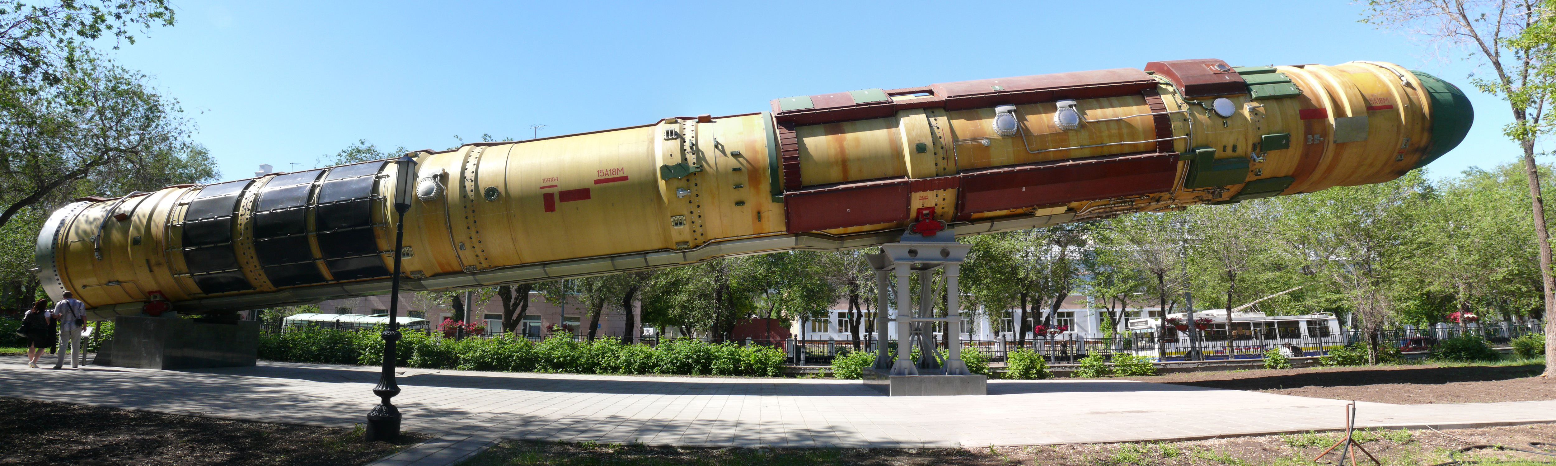 Межконтинентальная баллистическая ракета Р-36М2 «Воевода» в ТПК, установленная на территории выставочного комплекса «Салют, Победа!», Оренбург